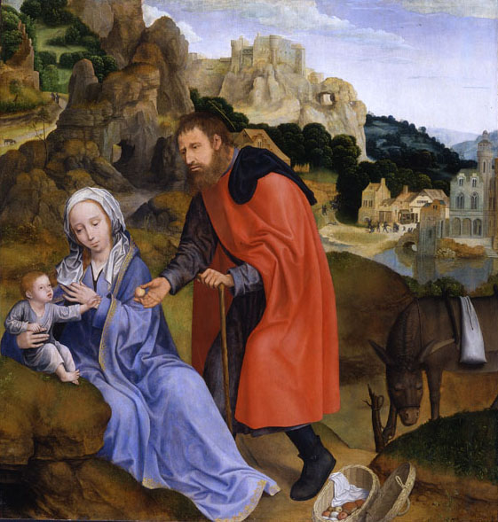 Descanço na fuga para o Egito por Quinten Massijs I, parte de um antigo retábulo no Mosteiro da Madre de Deus de Lisboa, hoje no Museu de Arte de Worcester.